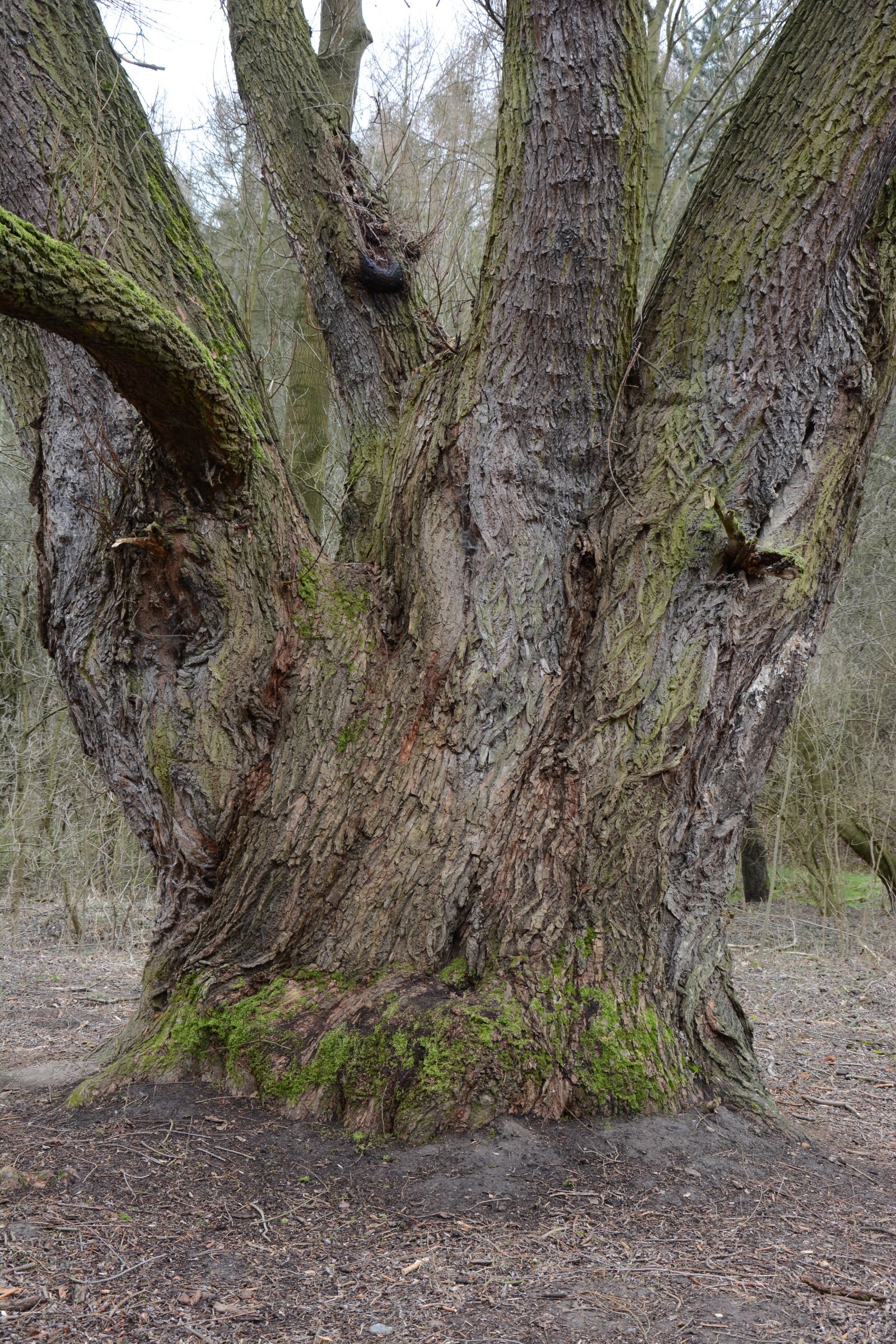 "Vrba zapomenutá", významný strom, Praha - Suchdol